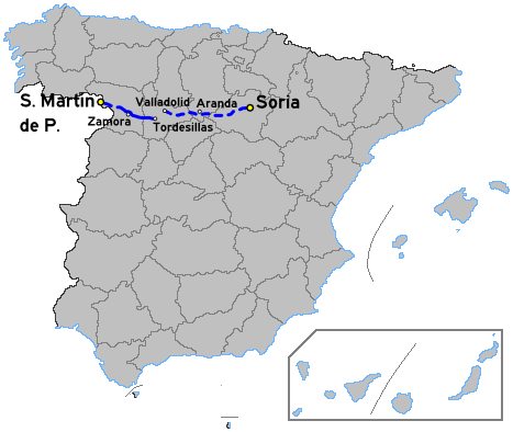 Mapa de la autovia A-11